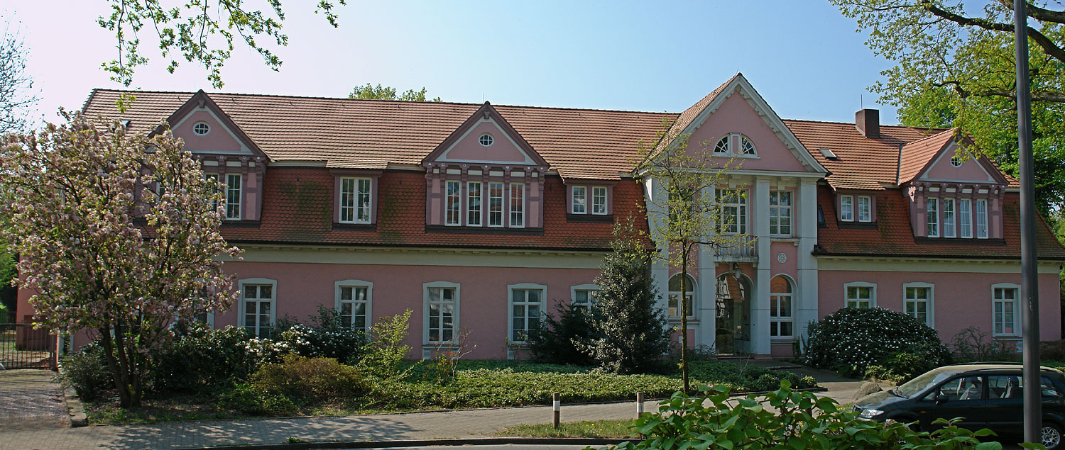 Klinikum Dr. Heines, Bremen-Oberneuland